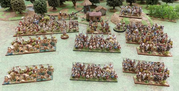 Figurines historiques carthaginoises 15mm pour jouer à BannerWar